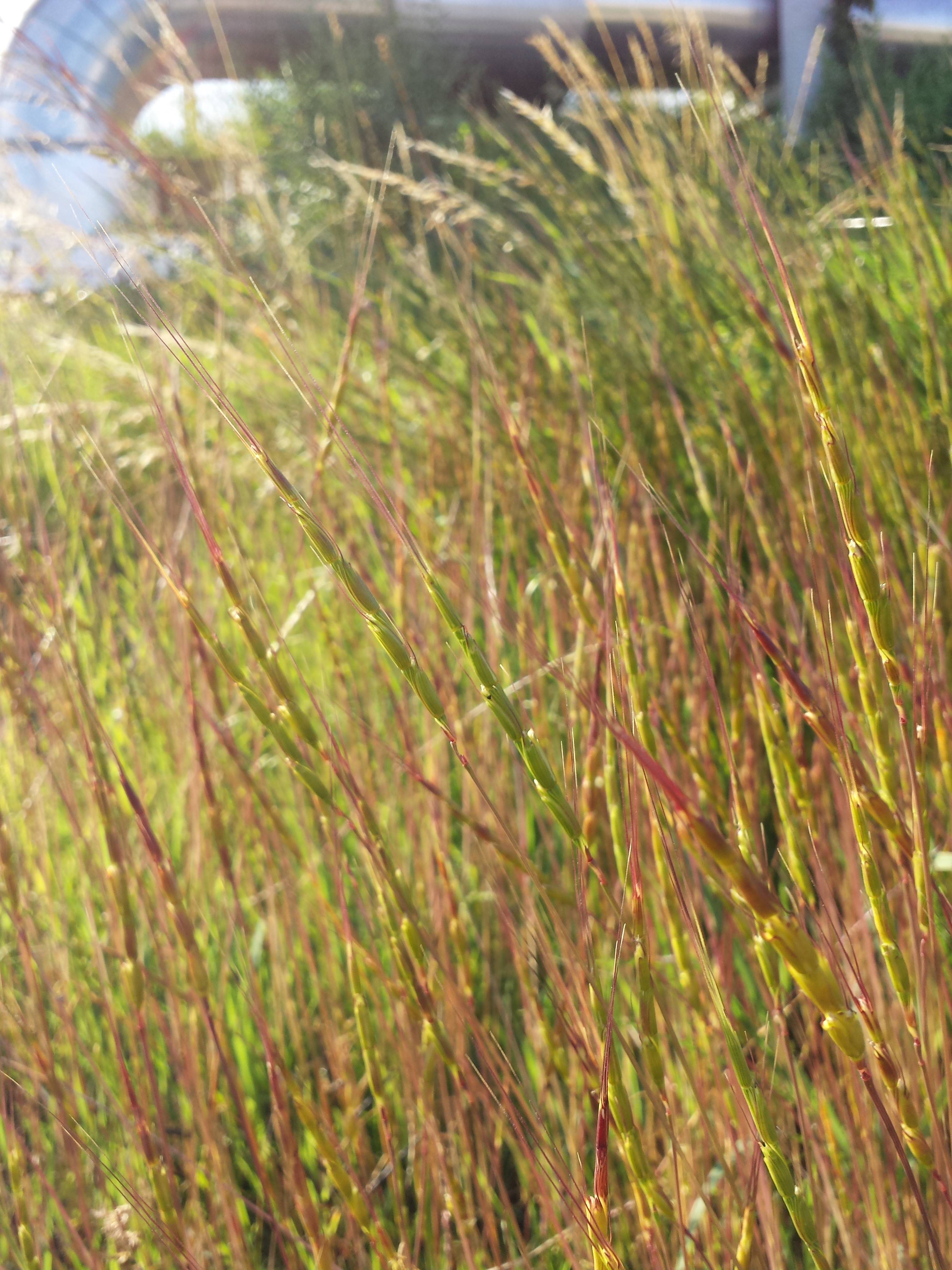 Ähren Taxonym: Aegilops cylindrica ss Fischer et al. EfÖLS 2008 ISBN 978-3-85474-187-9 Fundort: Bahnhof Wien-Floridsdorf, Wien-Floridsdorf - ca. 160 m ü. A. Standort: Eisenbahn-Ruderalfläche